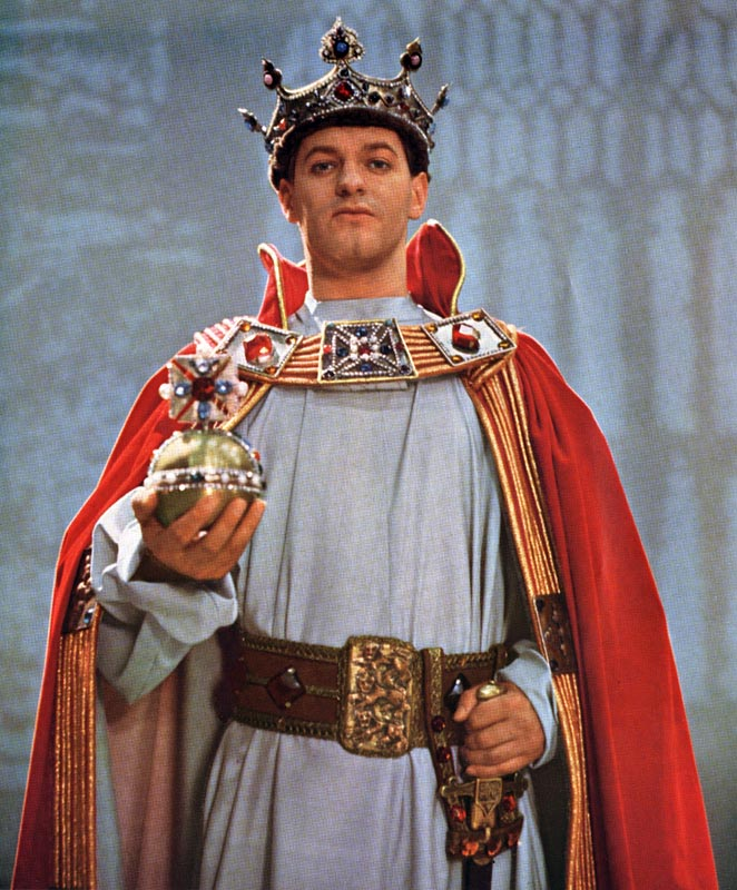 Henrik IV. TV-teater 1964